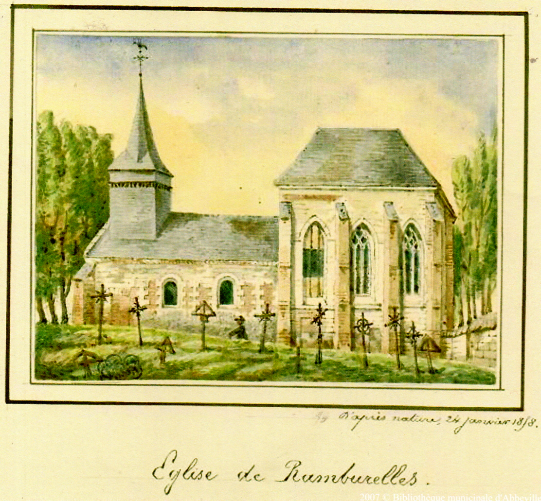 RAMBURELLES (Somme,France).Aquarelle de l'église de Ramburelles, d'aprés nature de 1858.D'Oswald Macqueron (1821-1899). Bibliothèque municipale d'Abbeville.